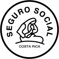 Logo de la Caja Costarricense del Seguro Social de Costa Rica